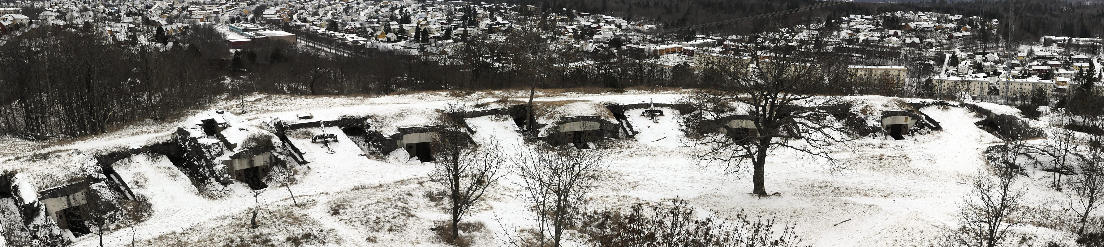 Brårudåsen batteri ved Horten. Batteriet er mer buet enn det panoramabildet gir inntrykk av